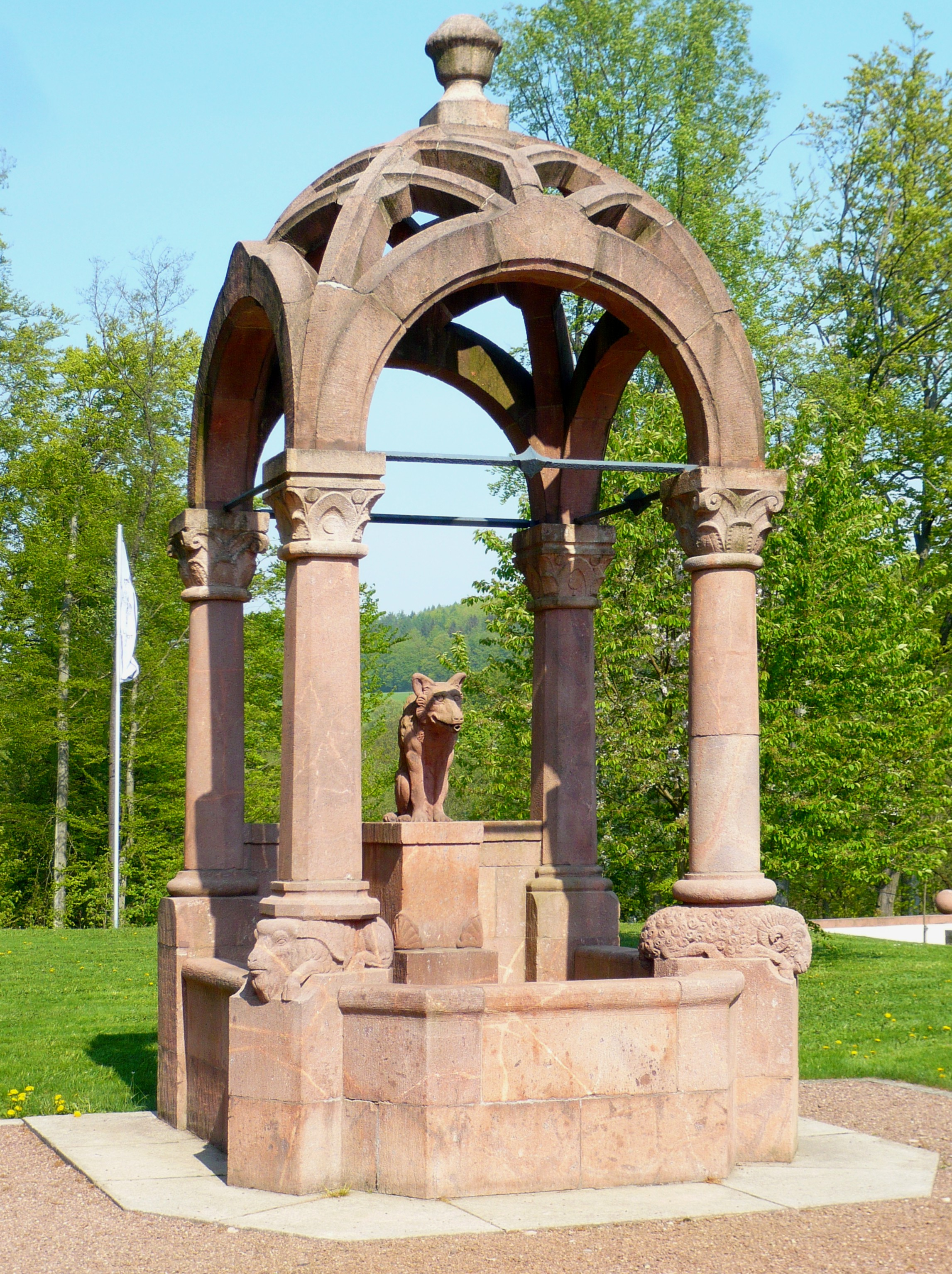 Schloss Wolfsbrunn, Hartenstein-Stein, "Wolfsbrunnen"